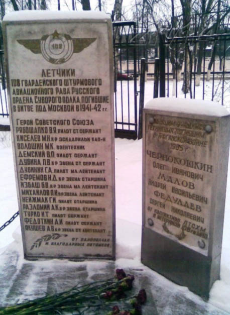 Памятник на территории ЛТСХМ